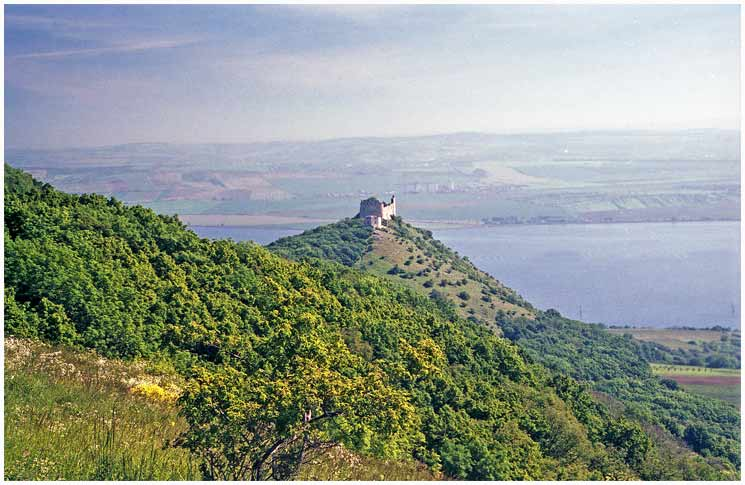 Fotografie zříceniny hradu Děvičky z úbočí Děvína.